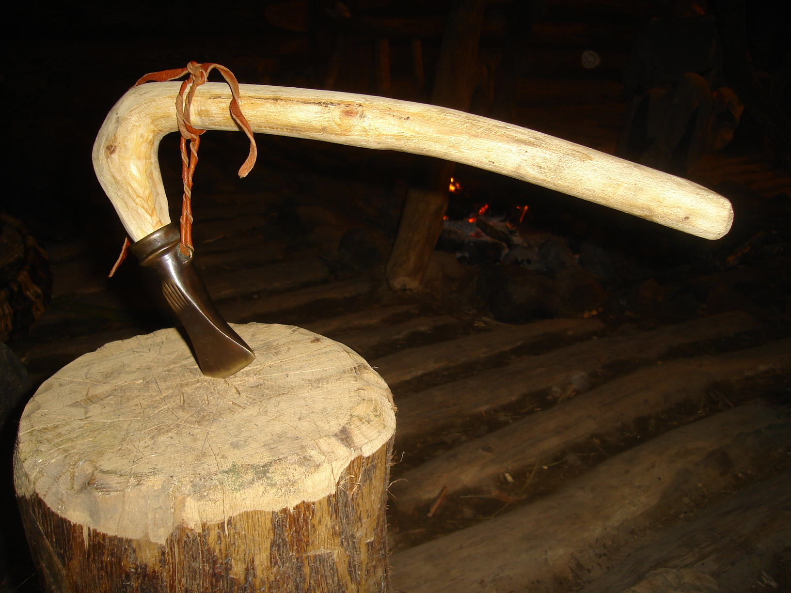 Rekonstrukcja toporu z tulejką z osady w Biskupinie.